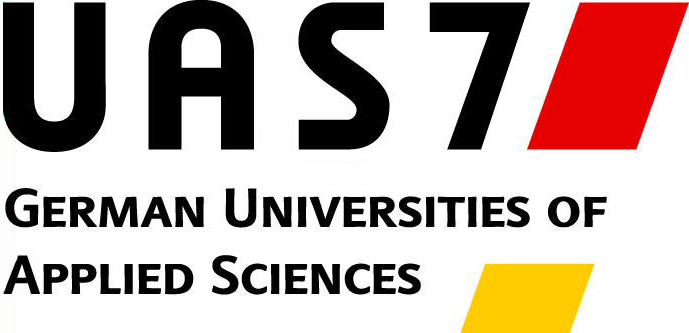 Logo des Vereins UAS7 e.V.